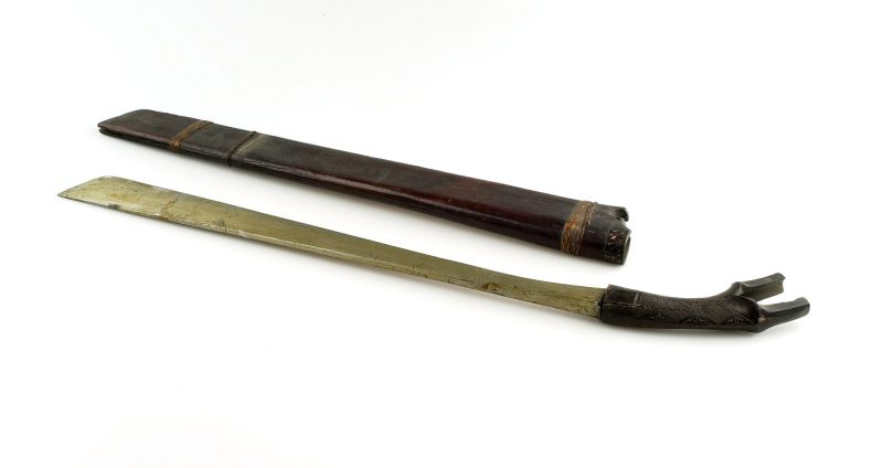 Zwaard. Zwaard met houten greep en houten schede Template:Nia